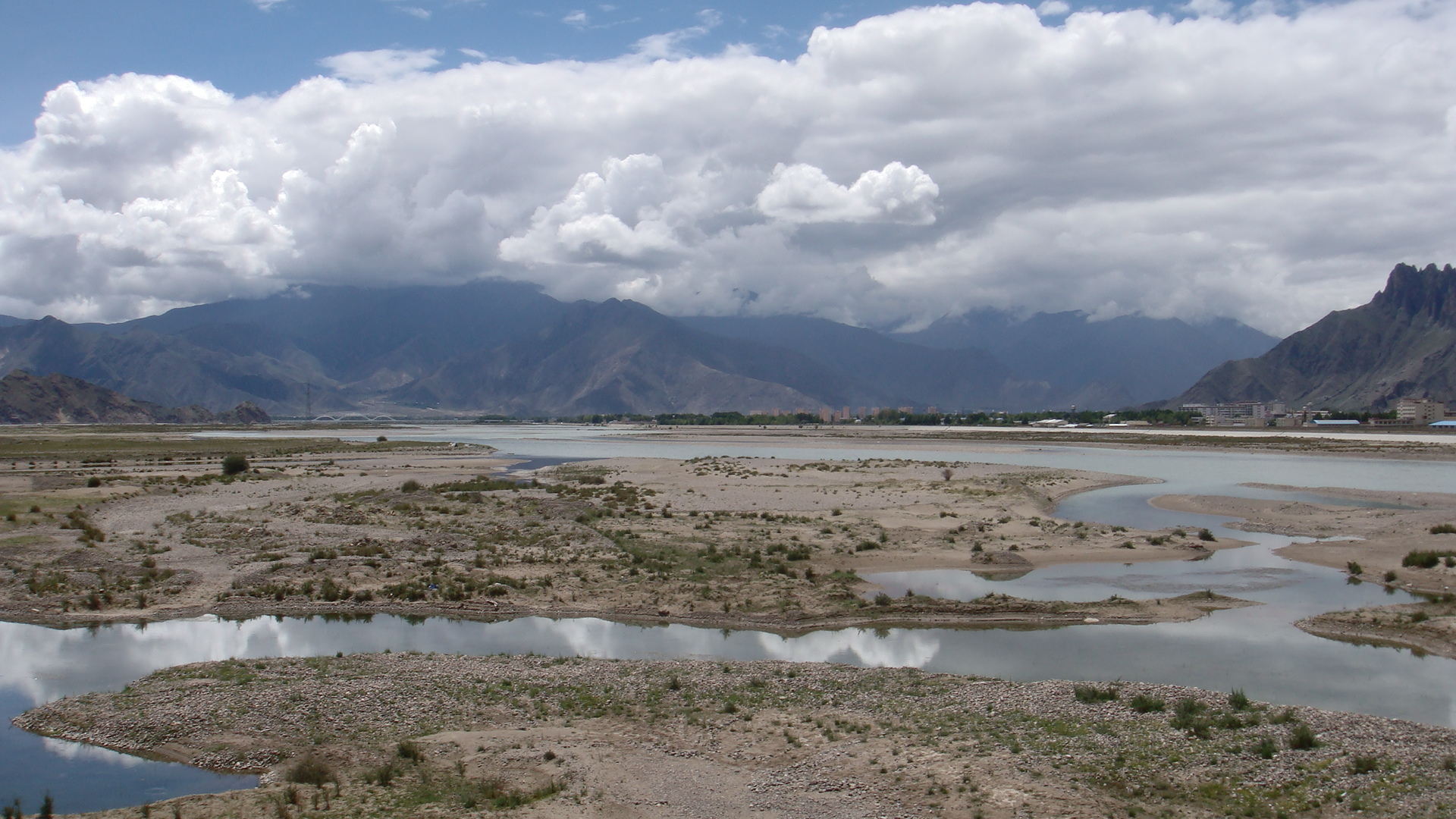 中国西藏拉萨市 China Lhasa Tibet China Xinjiang Urumqi Welcome you to tour the, Китай Синьцзяна Урумчи приветствовать Вас на экскурсию, الصين ترحب زيارتك لاورومتشى فى شينجيانغ, 中国新疆のウルムチへの訪問を歓迎する, 中国新疆乌鲁木齐欢迎您来观光旅游，